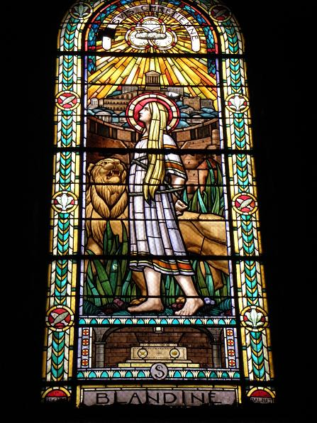 Vitrail de Ste-Blandine par Bégule (Eglise St-Pothin de Lyon)